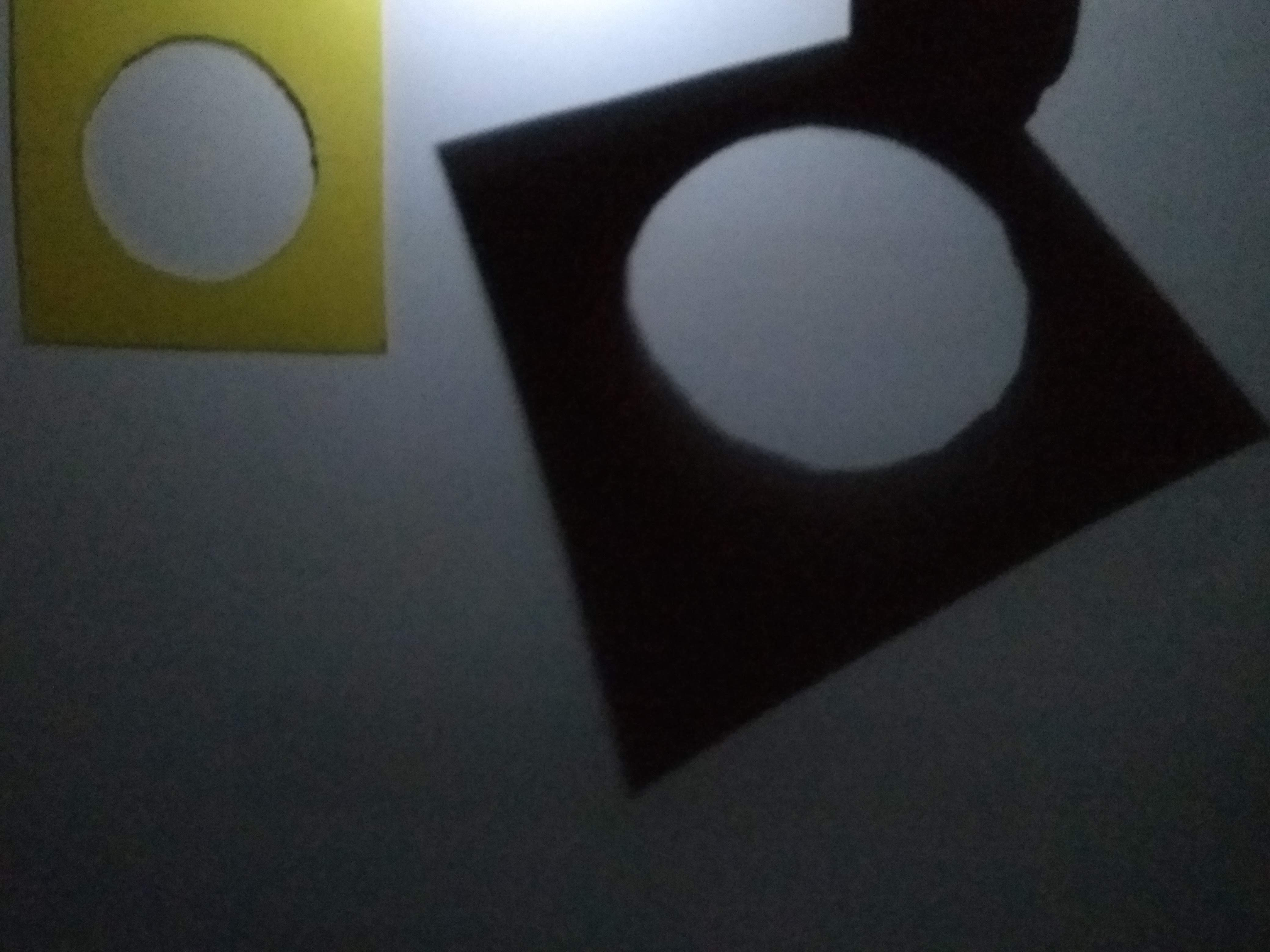 Cercle dans un carré et ombre portée par une source lumineuse ponctuelle- Exemple de projection centrale